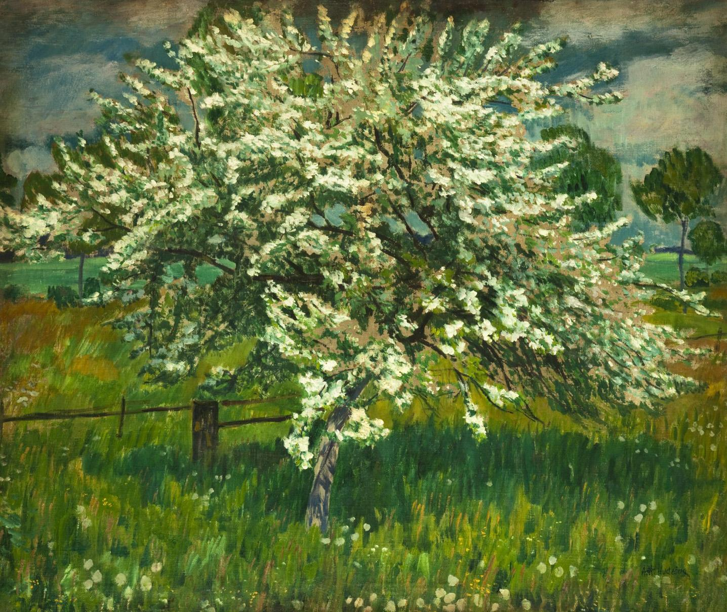 Blühender Apfelbaum. Rechts unten signiert: Ant. Hudeček, Öl auf Leinwand, 90 x 107,5 cm